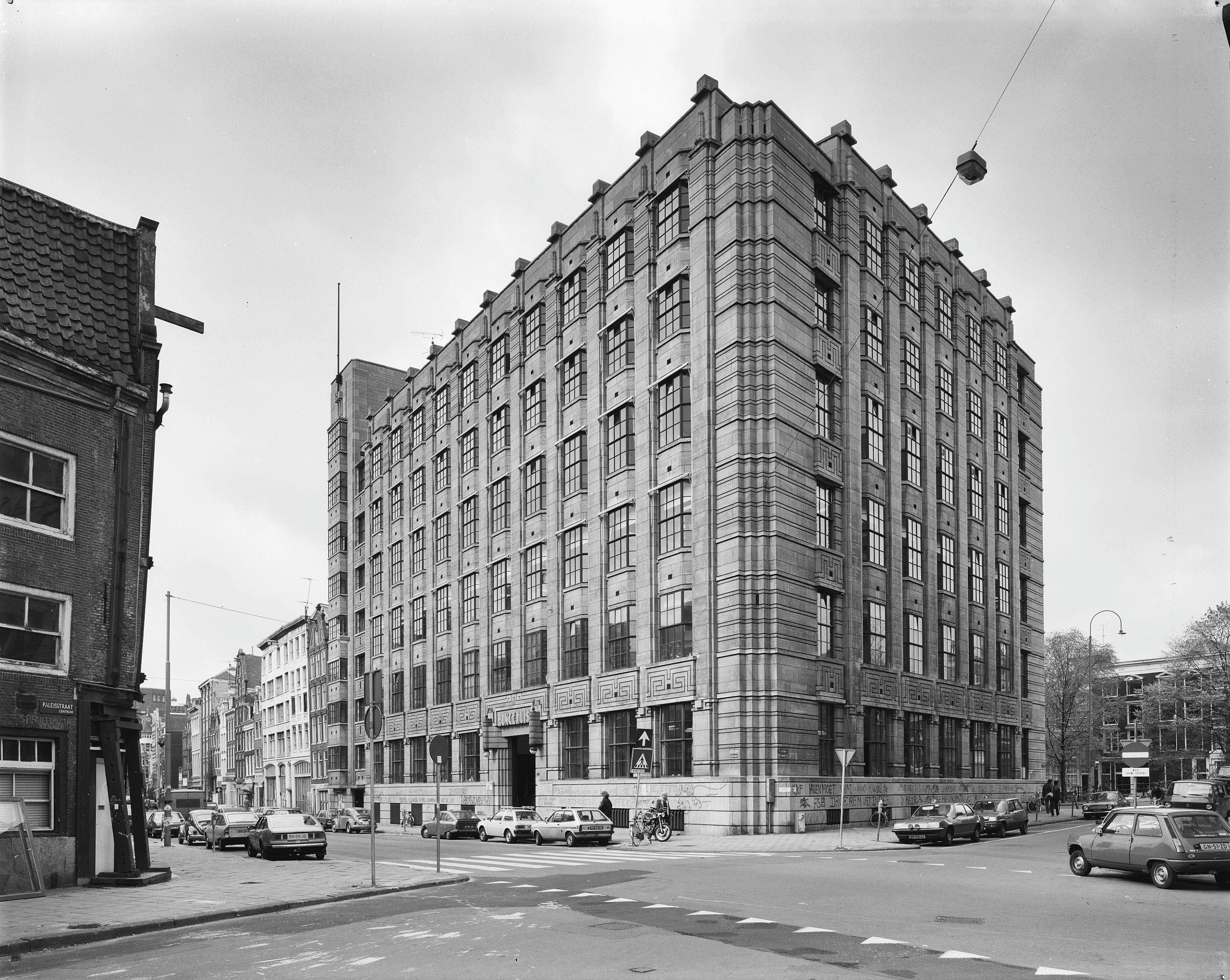 Spuistr./Singel, voorgevel Bungehuis, Letterenfaculteit.